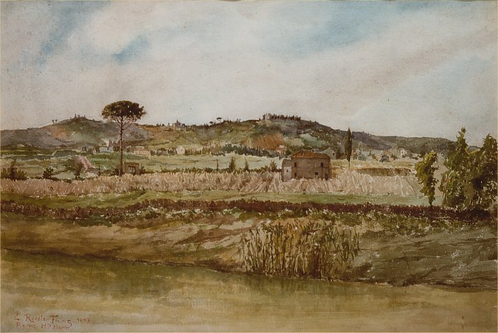 Prati di Castello e monte Mario in Rome (rione Prati)